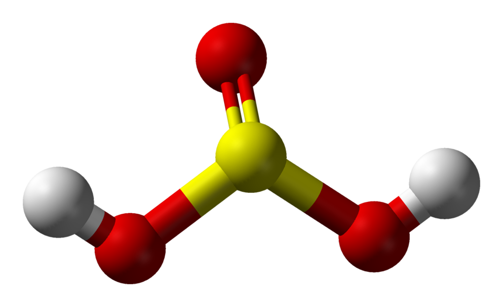 Sulfit turşusu 3D